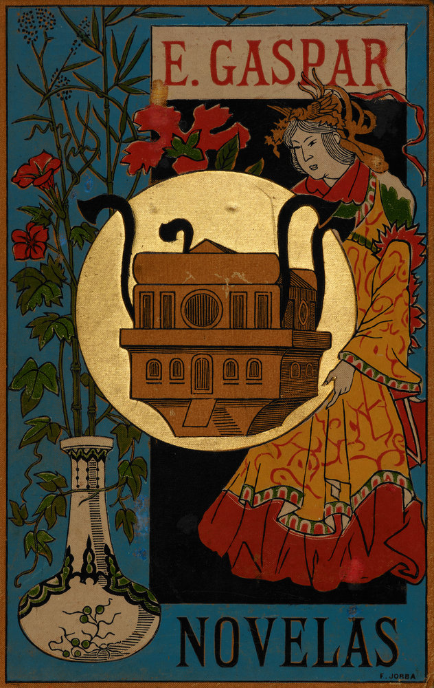 Portada de El anacronópete «Tanto esta cubierta como las ilustraciones de texto fueron realizadas cuando sólo tenía 17 años por el pintor y dibujante catalán Gómez Soler, nacido en 1870 y fallecido en 1899, que dedicó la mayor parte de su corta vida a trabajar como ilustrador para revistas y editoriales. Poseía un dibujo fino y fácil, de trazo seguro y desenvuelto.» [1]